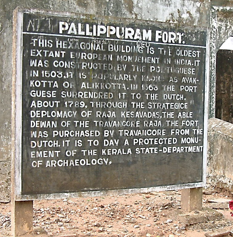 പള്ളിപ്പുറം കോട്ട ( അയീക്കോട്ട)